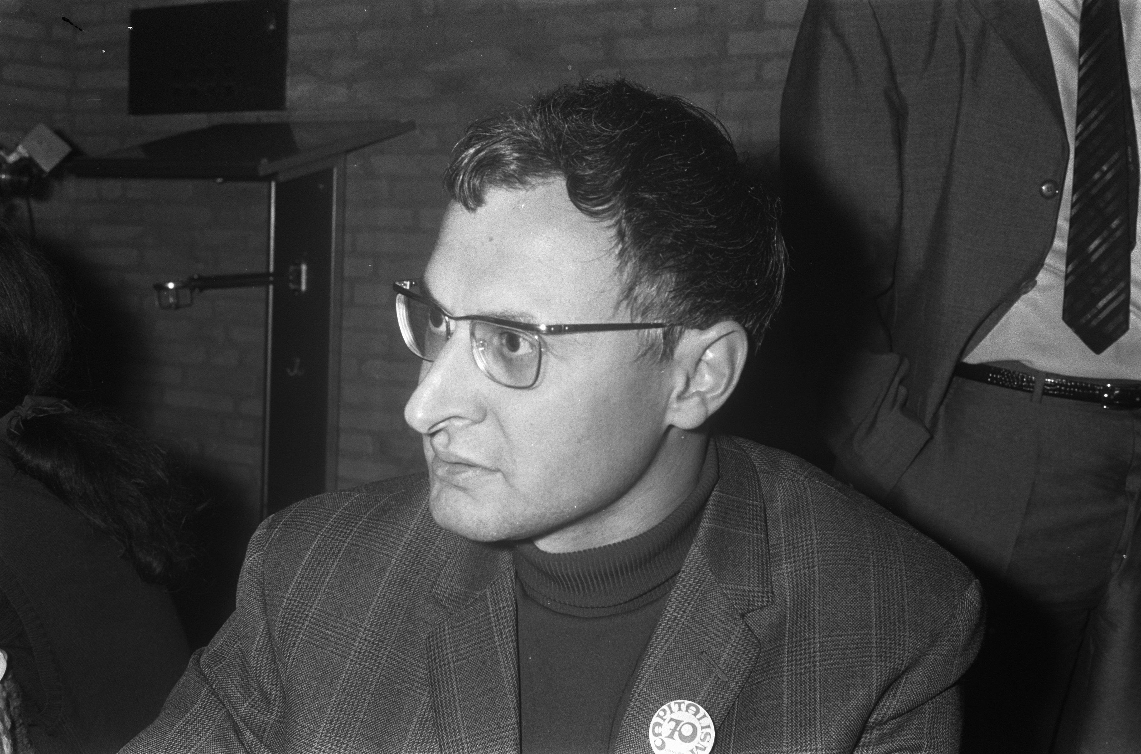 Collectie / Archief : Fotocollectie Anefo Reportage / Serie : [ onbekend ] Beschrijving : Congres over "Kapitalisme in 70-er jaren" in Tilburgse Hogeschool ; prof. dr. Th van de Klundert , kop nr. 12: Elmar Altvader , kop, nr. 13: Bob Datum : 10 september 1970 Trefwoorden : congressen Persoonsnaam : Bob Rowthorn, prof. dr. Th van de Klundert Fotograaf : Koch, Eric / Anefo Auteursrechthebbende : Nationaal Archief Materiaalsoort : Negatief (zwart/wit) Nummer archiefinventaris : bekijk toegang 2.24.01.05 Bestanddeelnummer : 923-8344